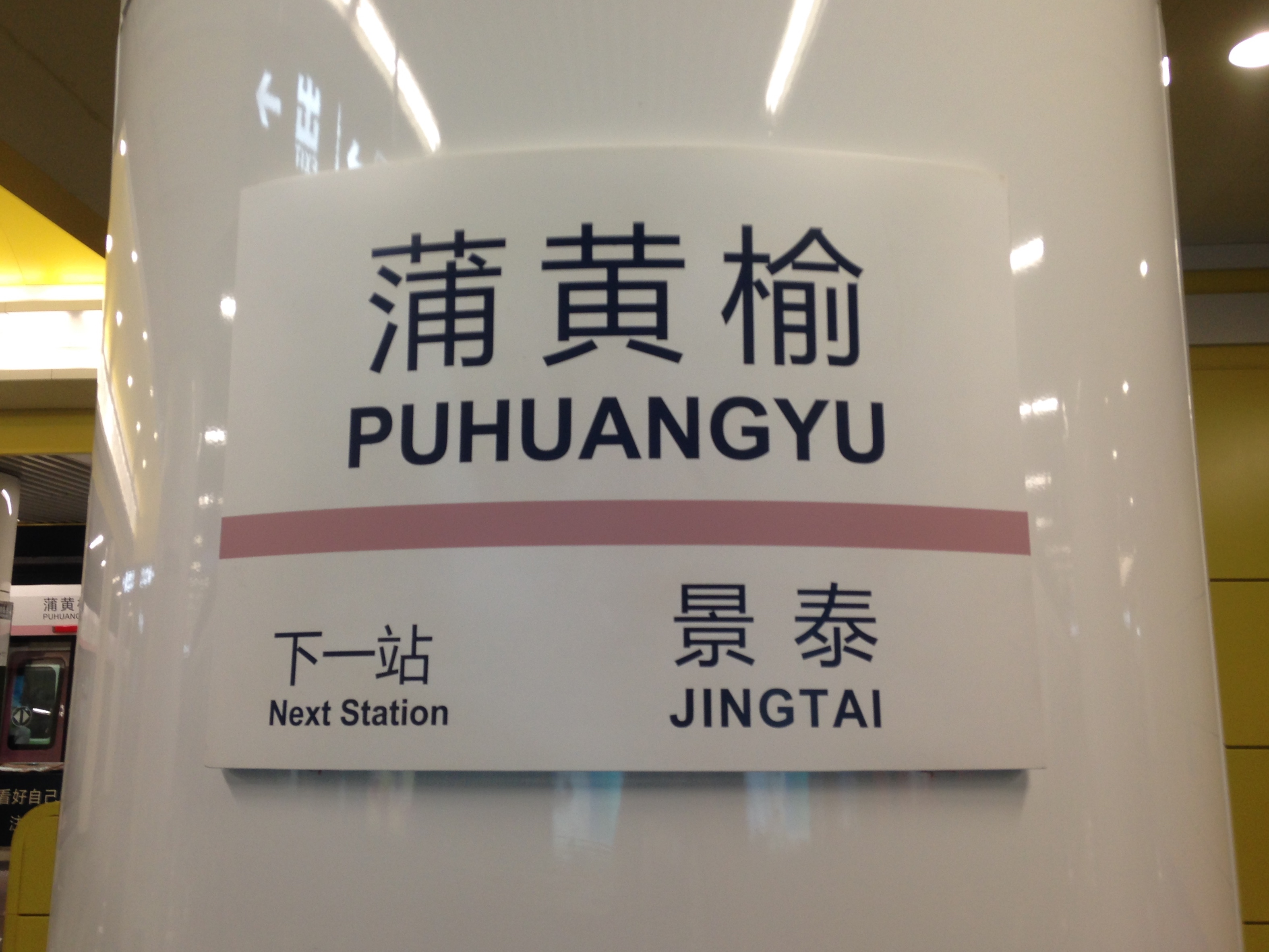 蒲黄楡駅(北京地下鉄14号線)の駅名標